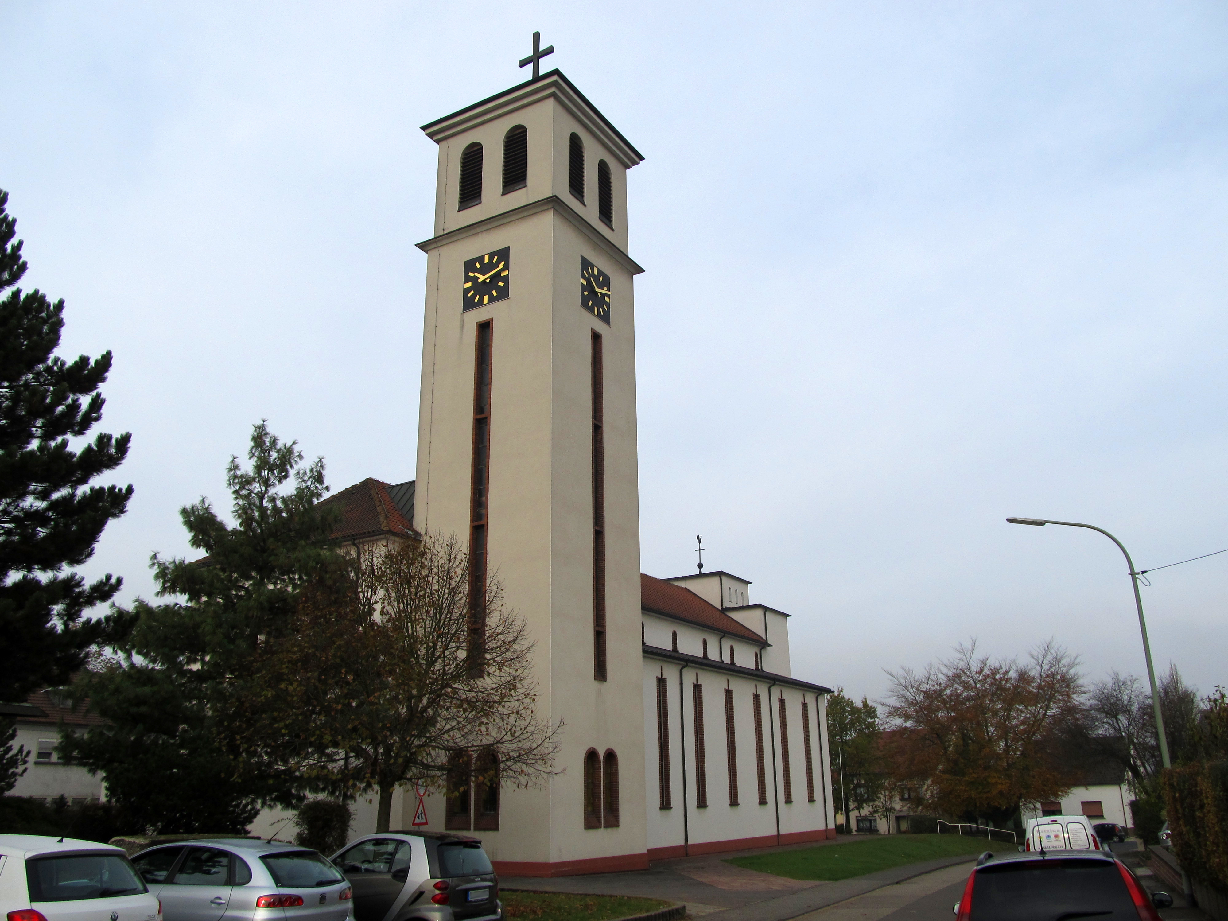 Die katholische Pfarrkirche „Zu den heiligen Schutzengeln“ in Schaffhausen, einem Ortsteil der Gemeinde Wadgassen, Saarland